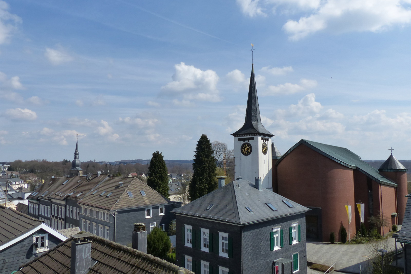 Blick auf die Katholische Kirche St. Michael von Norden. Links im Hintergrund Turm der evangelischen Stadtkirche.